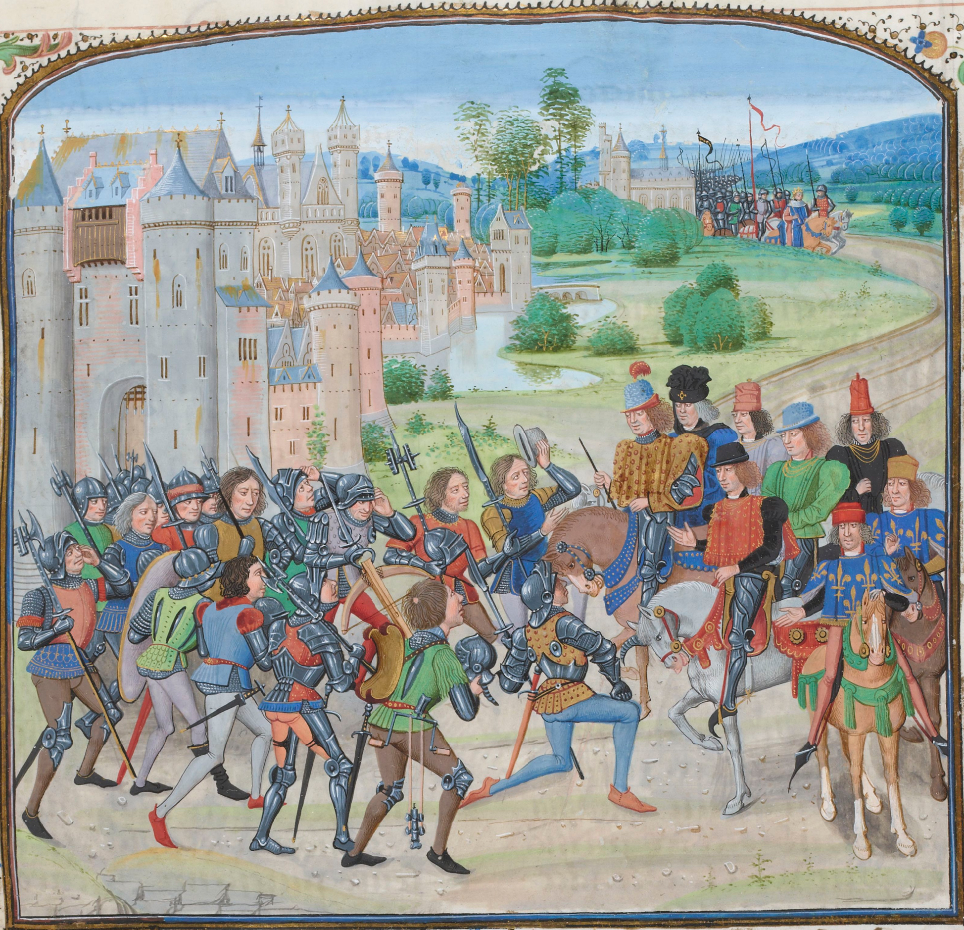 En 1383, après la bataille de Roosenbeke où ses troupes ont écrasé les rebelles flamands, Charles VI soumet les villes. Ses envoyés communiquent aux Parisiens les conditions de leur soumission.